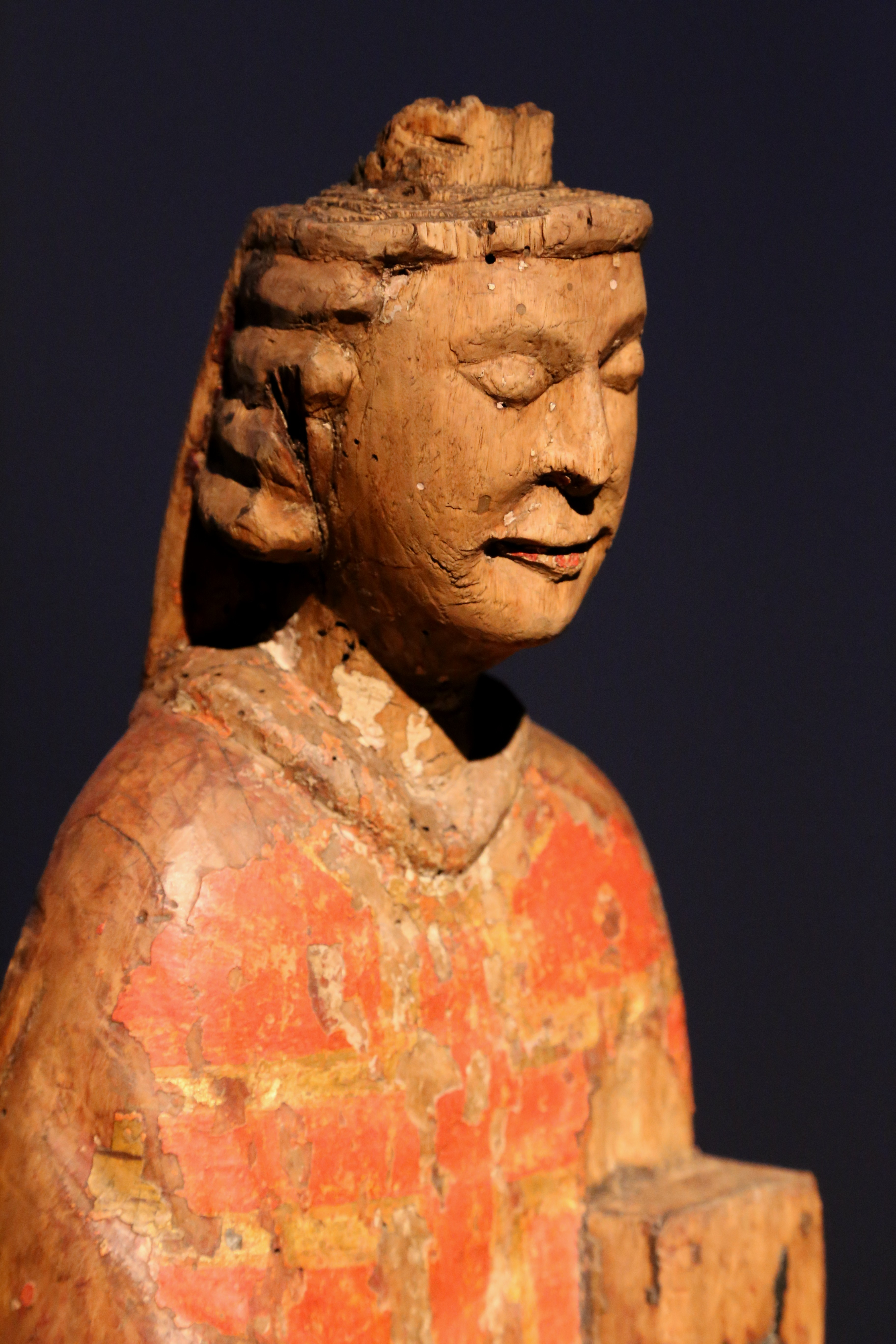 Thronender Bischof, Schwaben, um 1220/30, Erlenholz, Reste einer alten Farbfassung, übermalt, Germanisches Nationalmuseum, Nürnberg